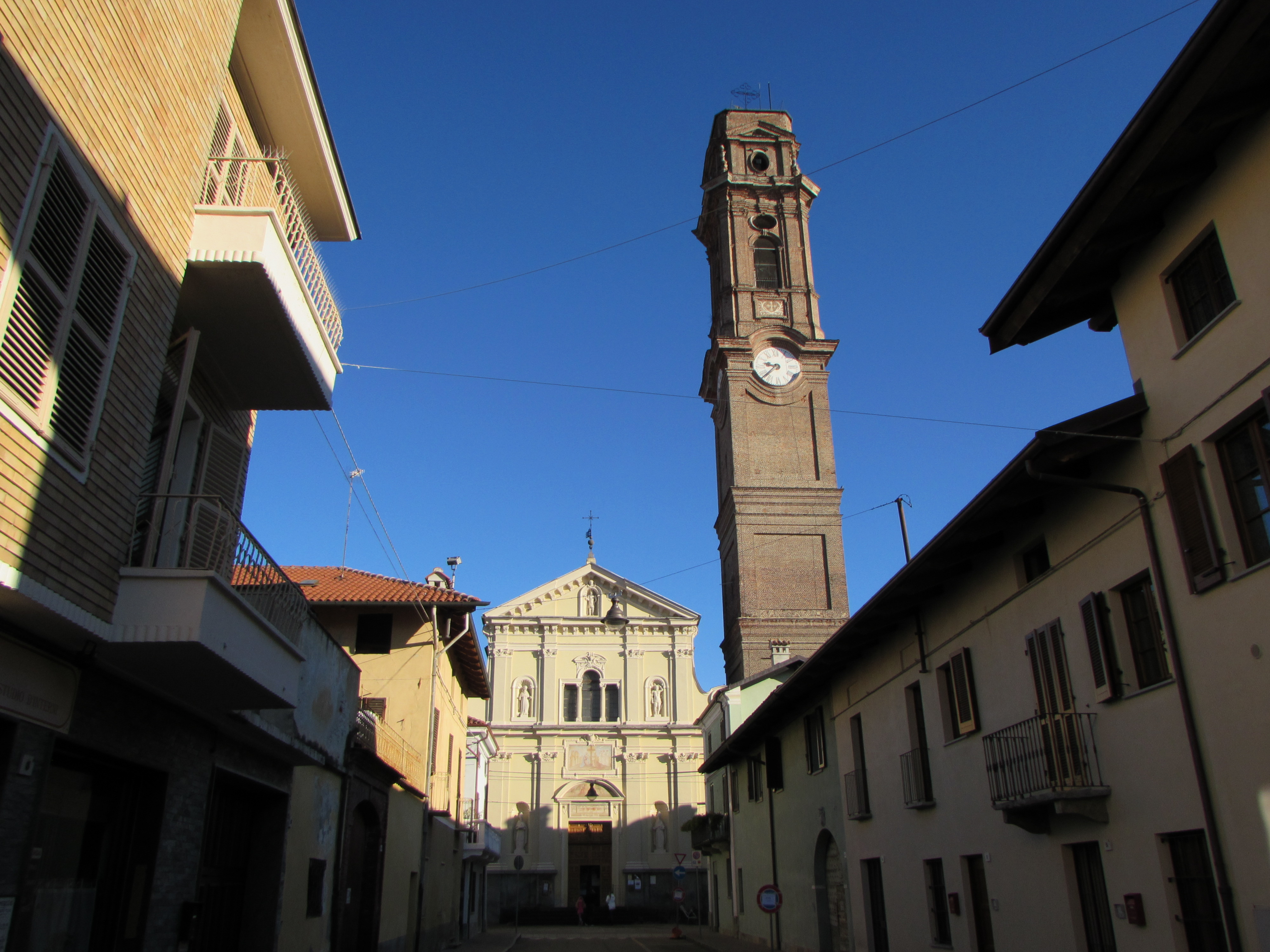 Chiesa Parrocchiale di San Maurizio